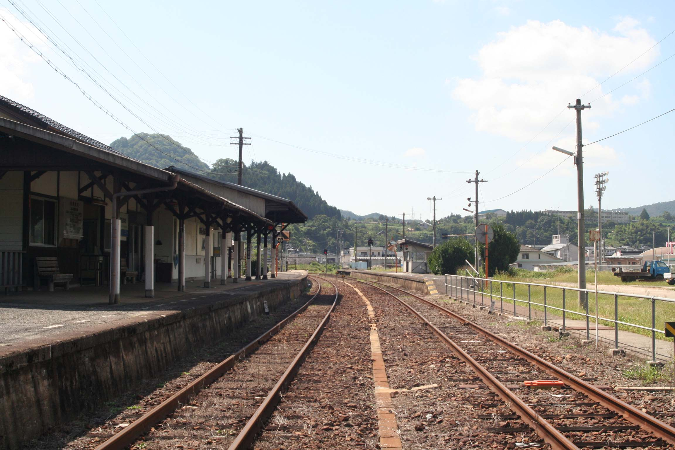 西日本旅客鉄道 備後西城駅の構内